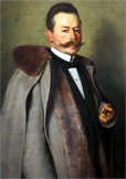 Porträtfotografie Felix Hermann Maria Schoeller, Osnabrück